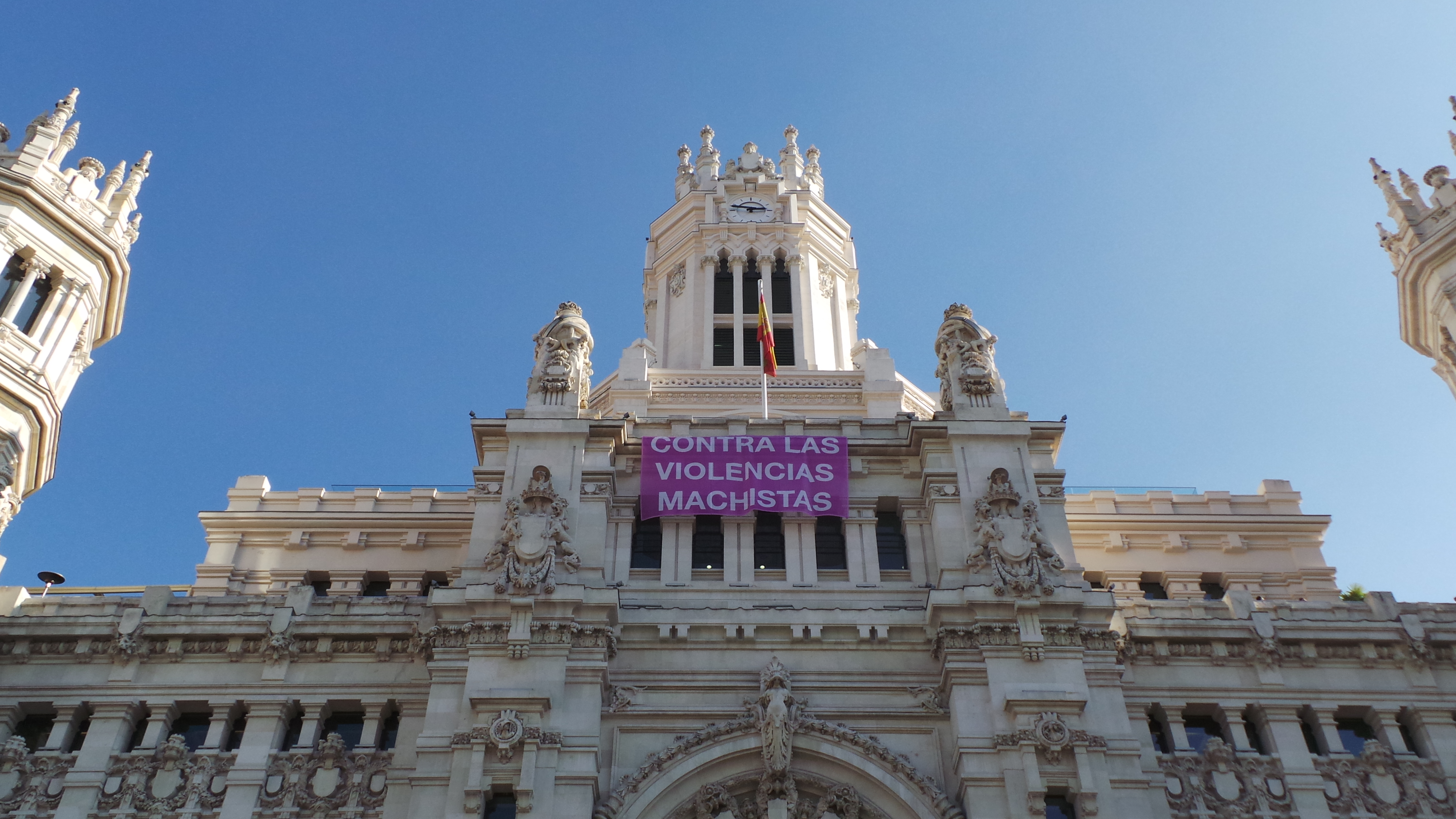 Banderola en el Ayuntamiento de Madrid en apoyo del 7N Marcha Estatal contra las violencias machistas